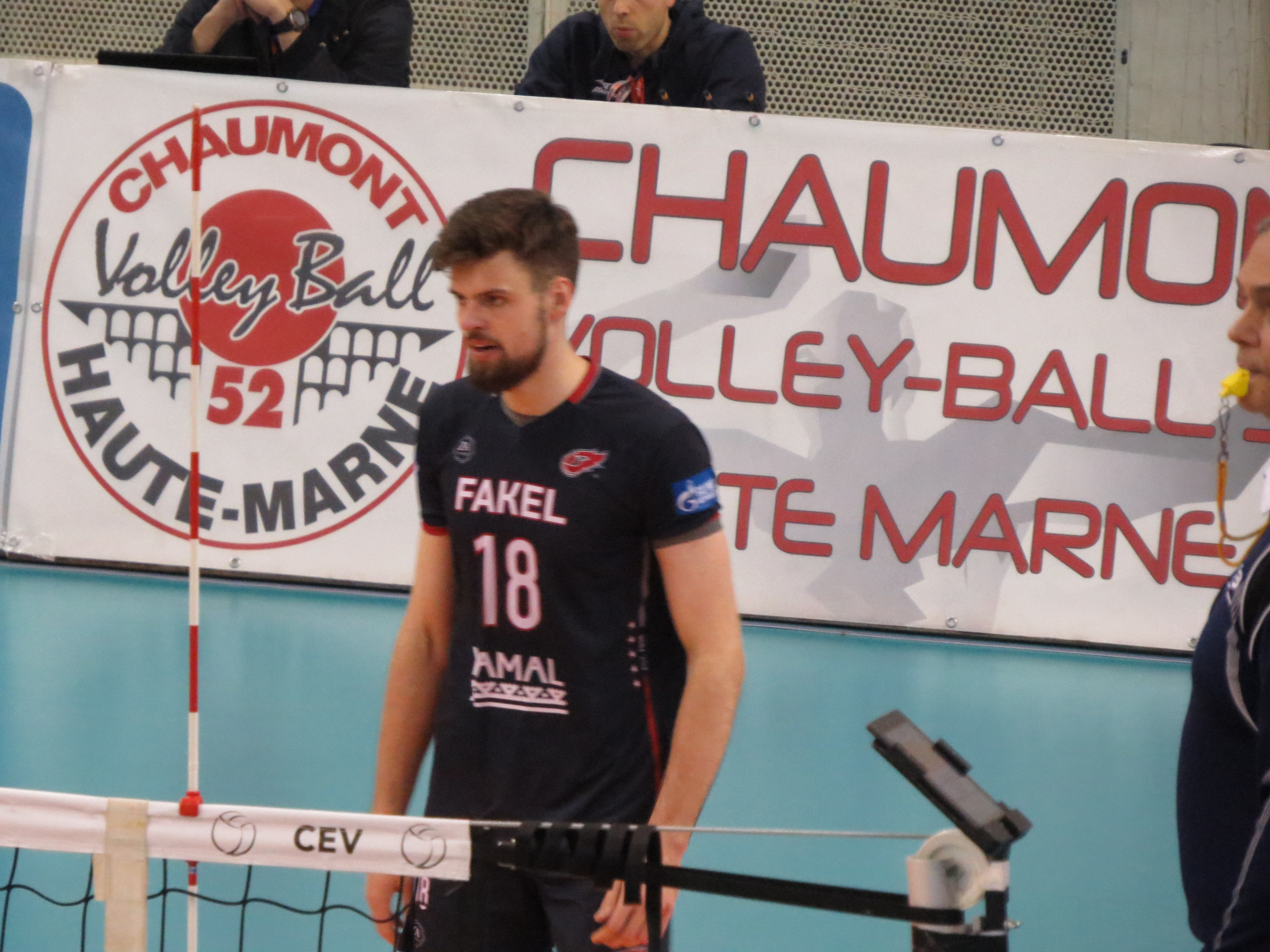 Photos réalisées lors de la finale aller de la Challenge Cup entre le Chaumont Volley-Ball 52 et le Fakel Novy Ourengoï à Paris (salle Charpy) 18 KLIUKA Egor